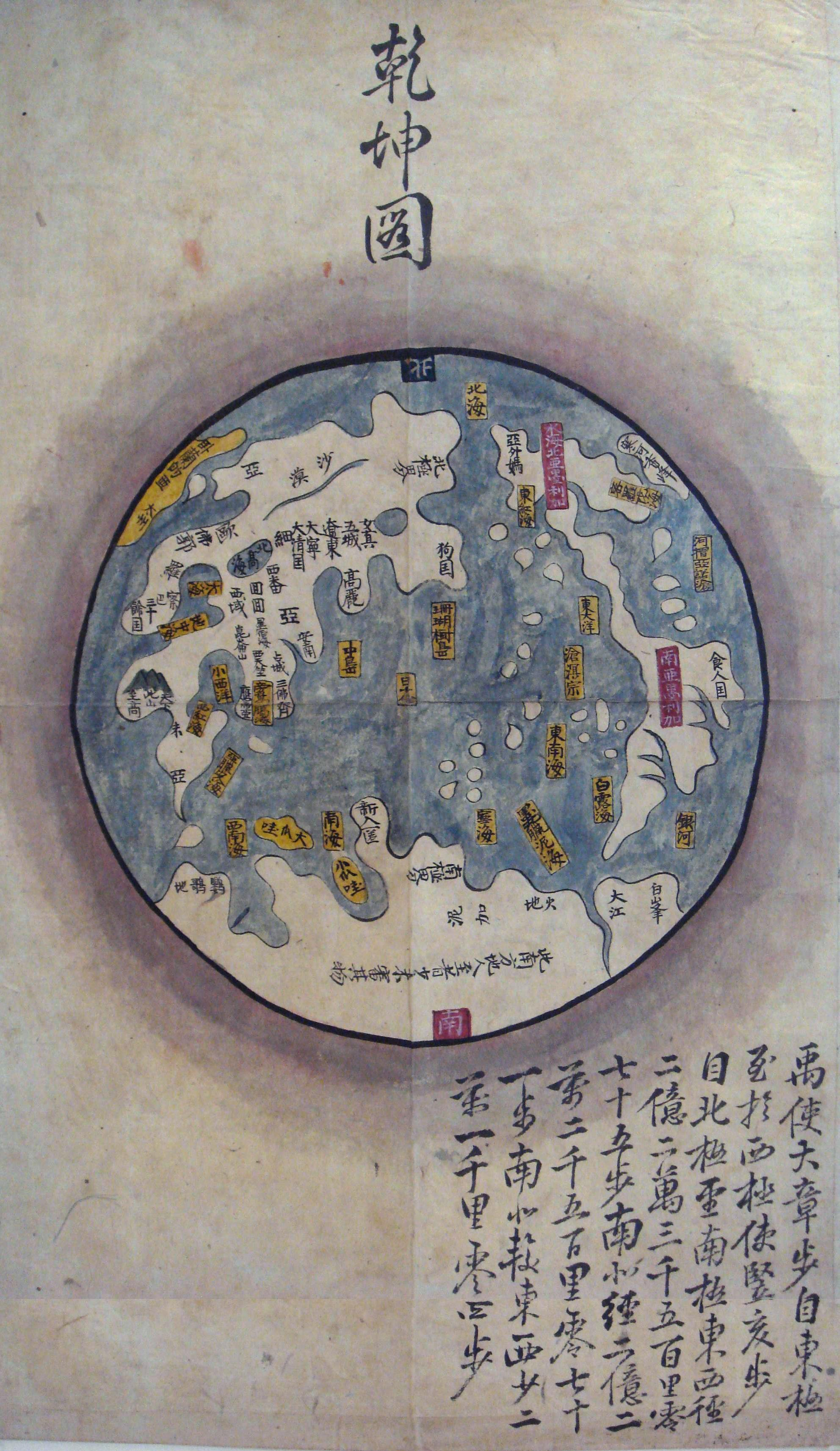 乾坤圖 Korean map 1800s